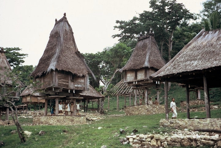 A beleza das casas da Ponta Leste